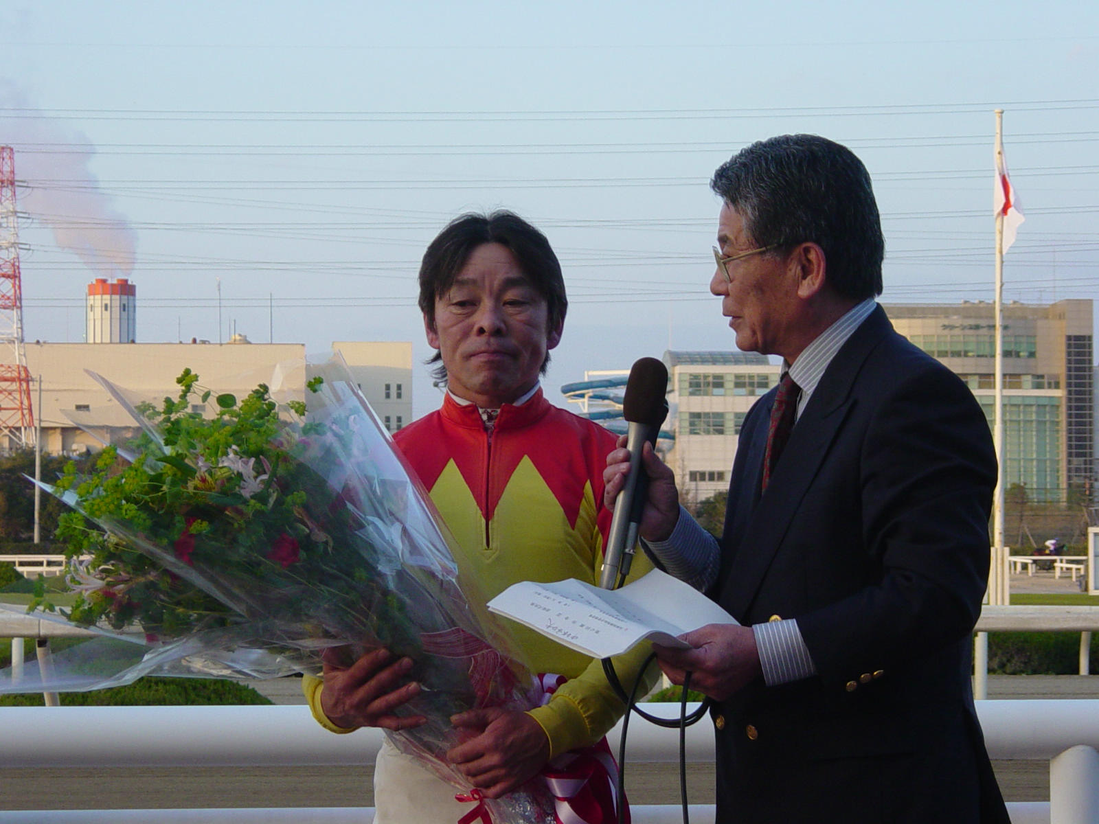 園田金盃を制しインタビューに答える有馬澄男 撮影日: 2004年12月1日 撮影場所: 園田競馬場 撮影者: りえたん